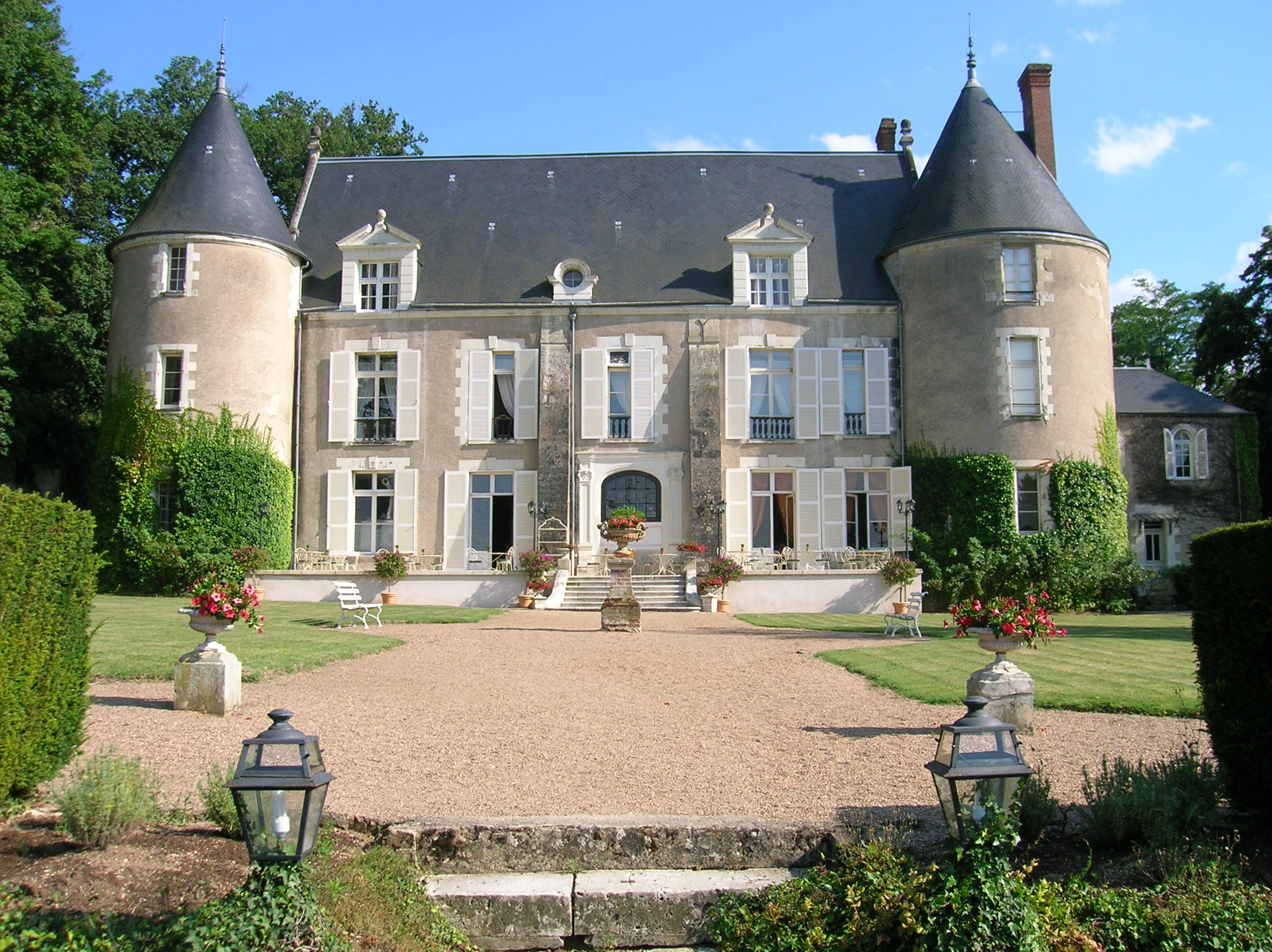 Château de Pray (commune de Chargé, Indre-et-Loire)